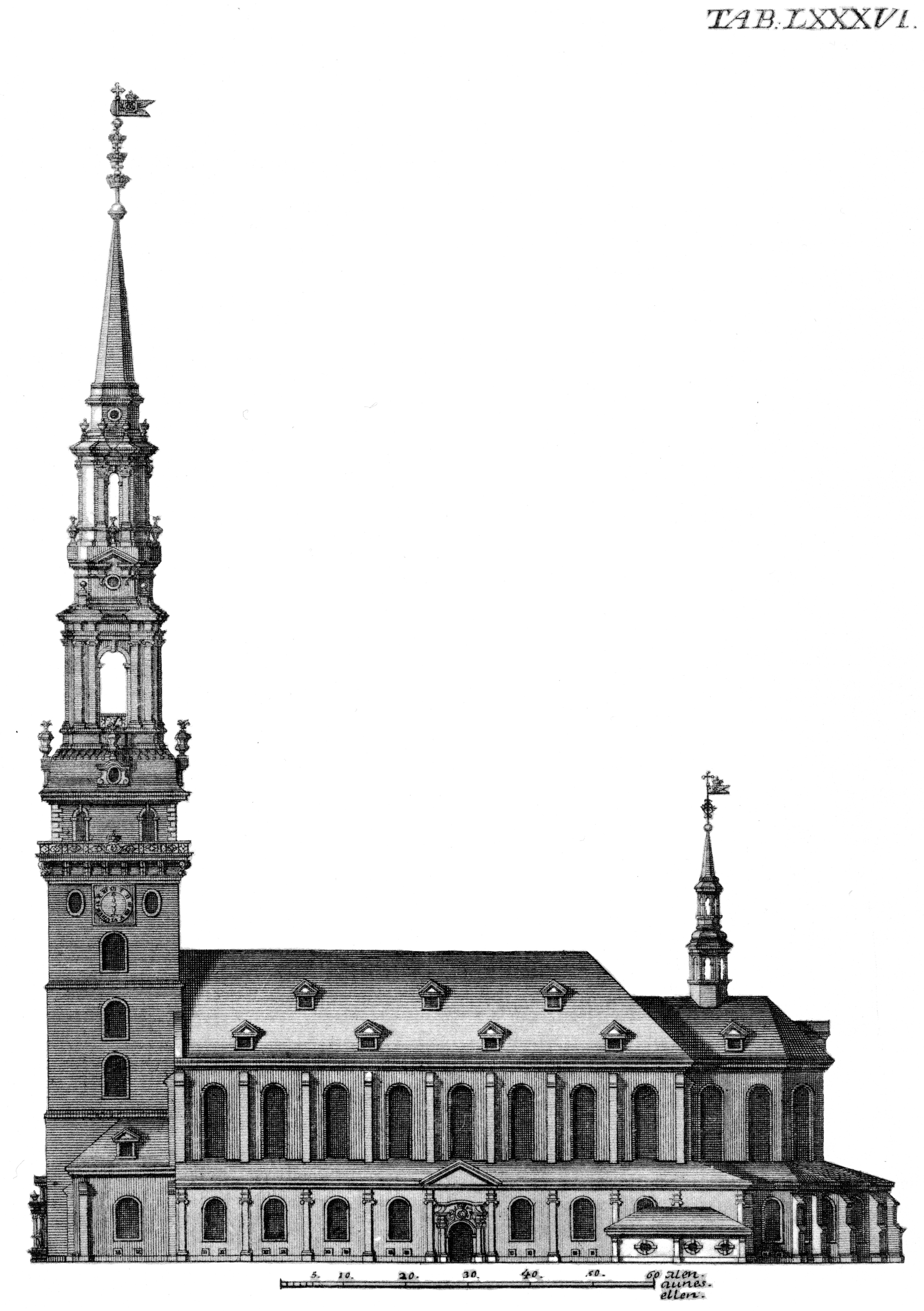 From Hafnia Hodierna by Laurids de Thurah, 1748. Tab.LXXXVI, Vor Frue Kirke